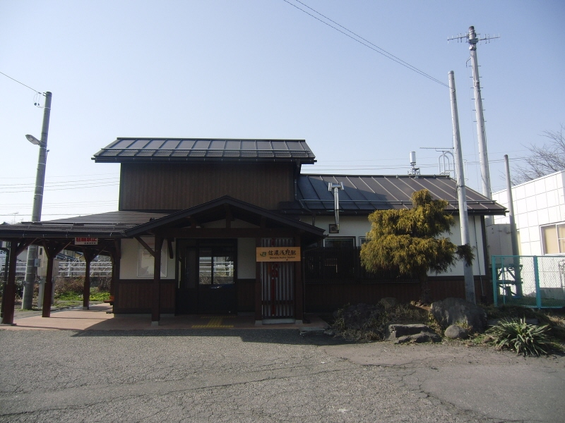 信濃浅野駅新駅舎です。